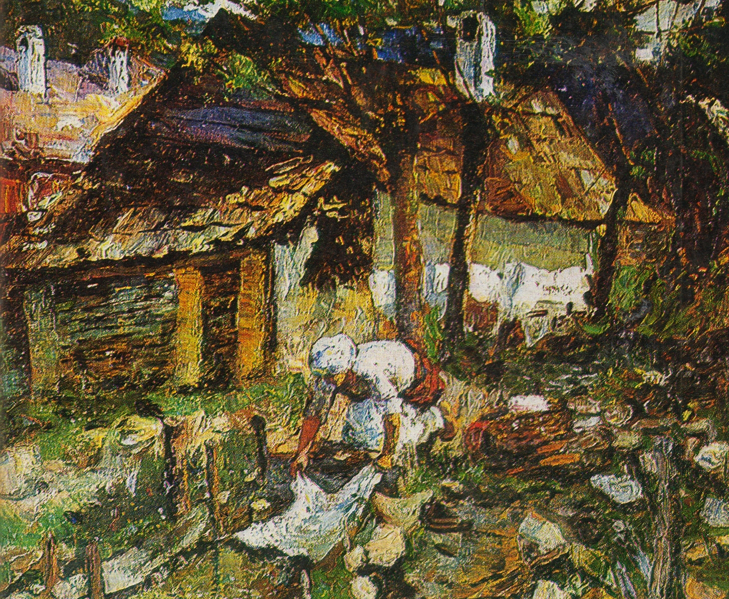 Spălătoreasa